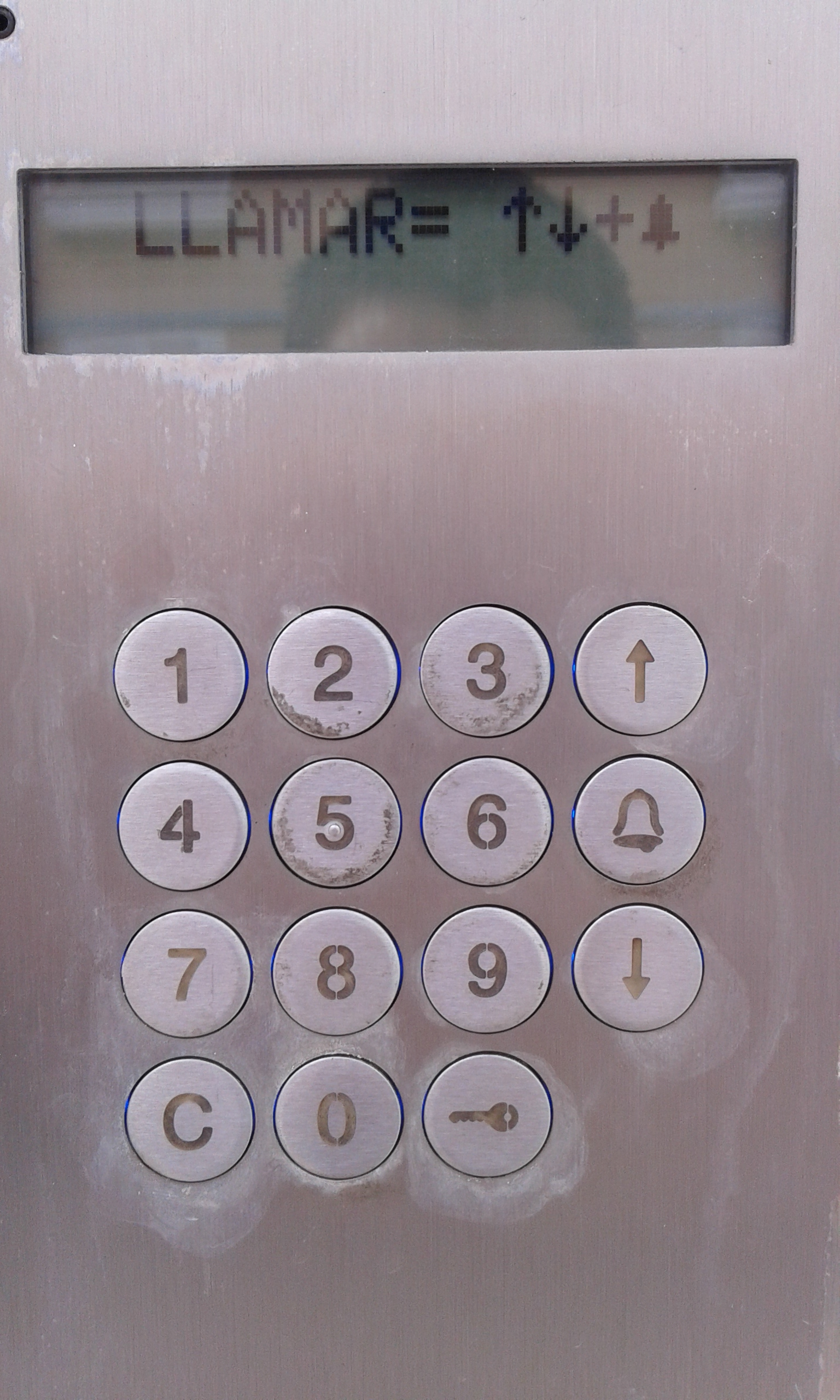 Fotografía de un teclado de acceso a una urbanización cerrada